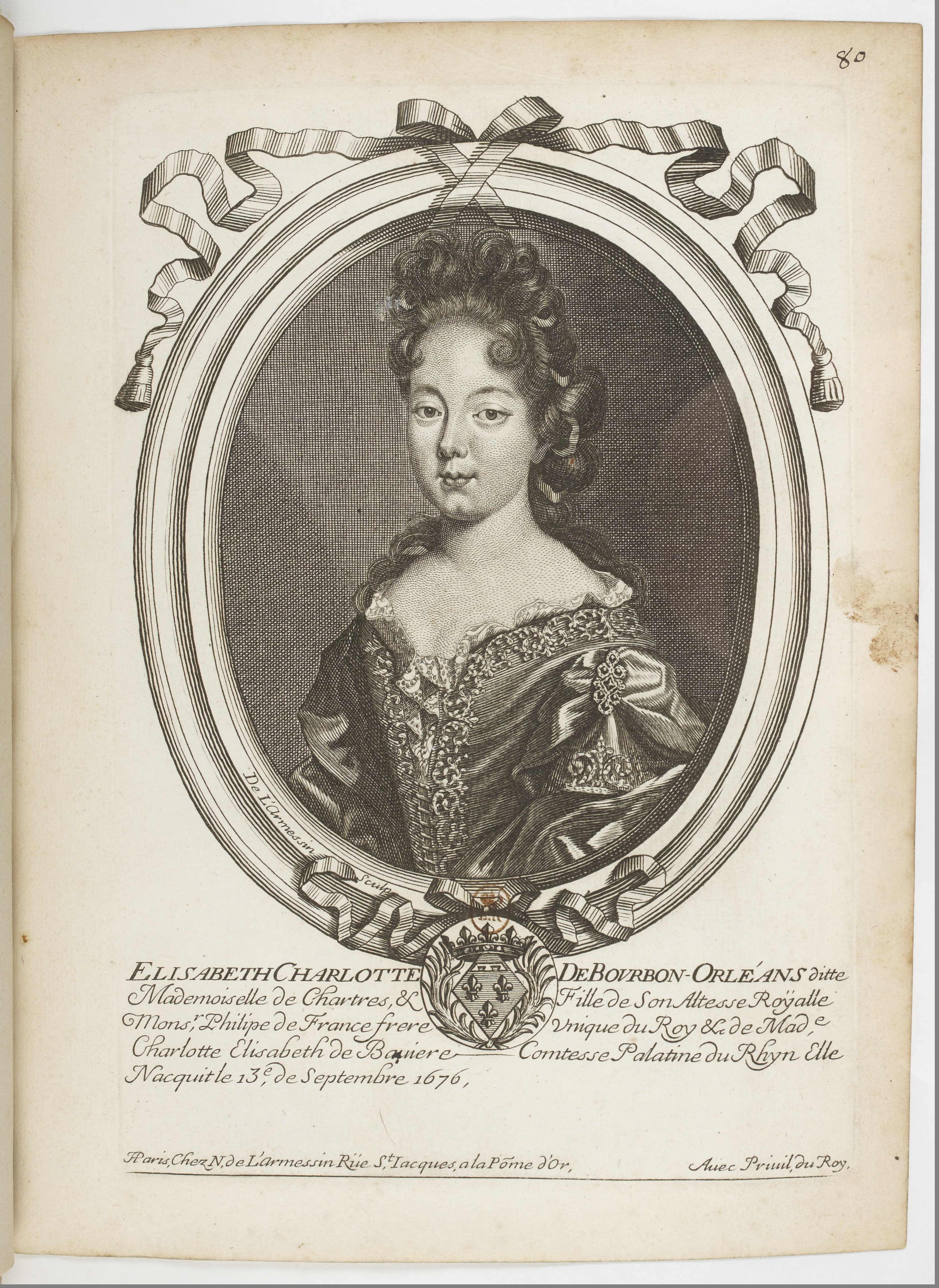 Les augustes représentations de tous les rois de France, depuis Pharamond jusqu'à Louis XIV,... avec un abrégé historique sous chacun, contenant leurs naissances, inclinations et actions plus remarquables pendant leurs règnes